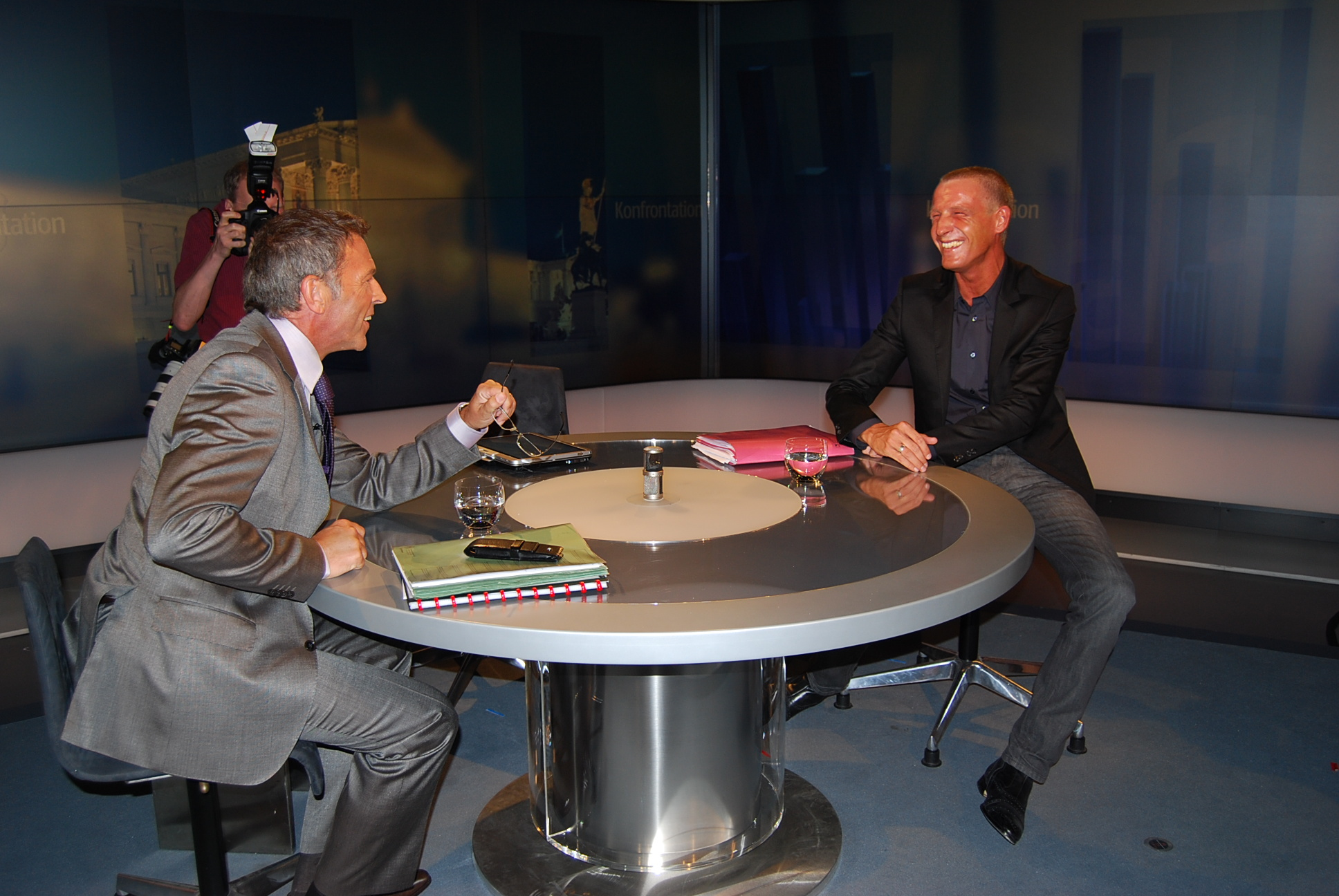 Jörg Haider und Stefan Petzner, 04.09.2008